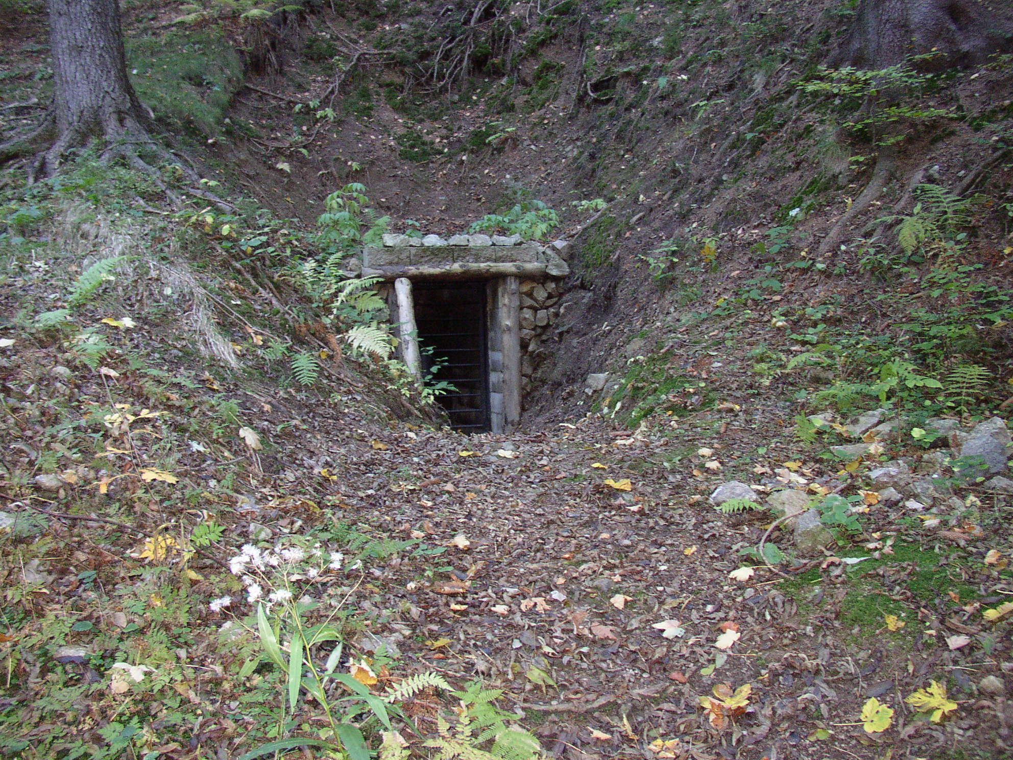 Portál štoly U Knížecí studánky, Dolní Podluží, okres Děčín, Česká republika